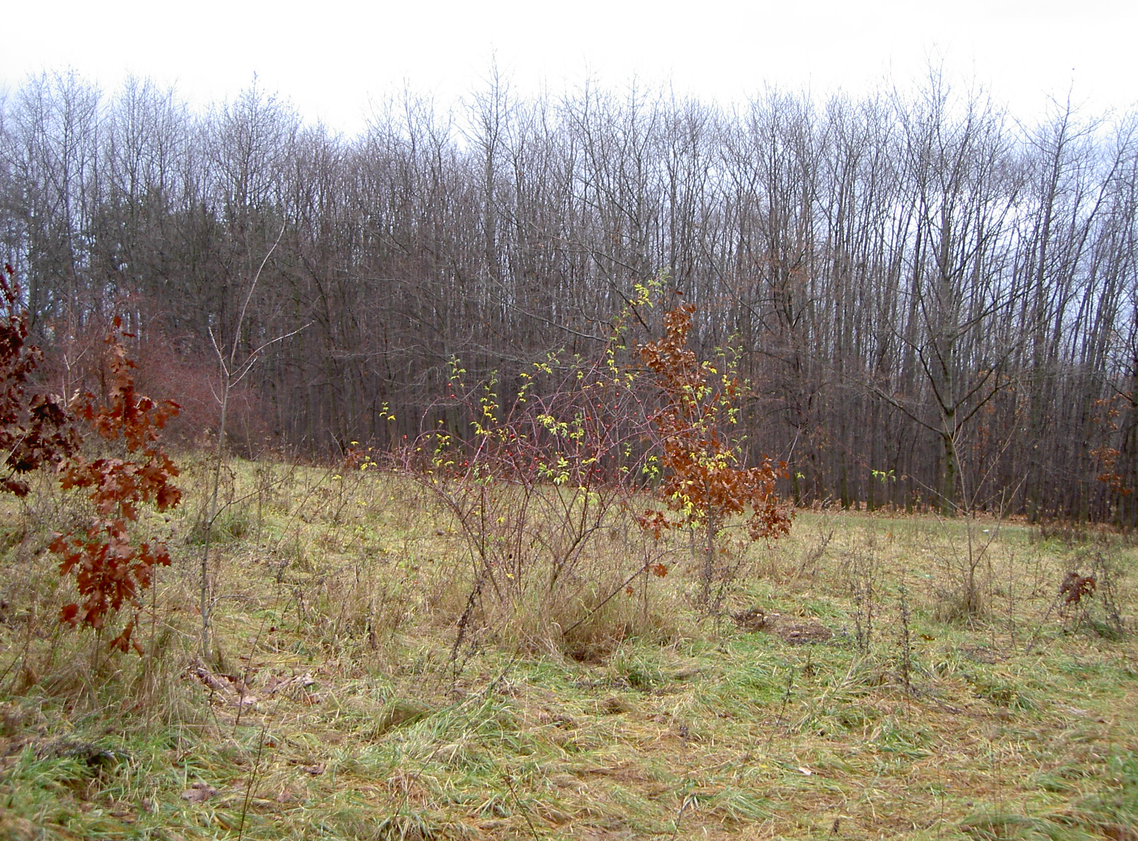 Lokalita Euscorpius teregestinus (Česká republika)